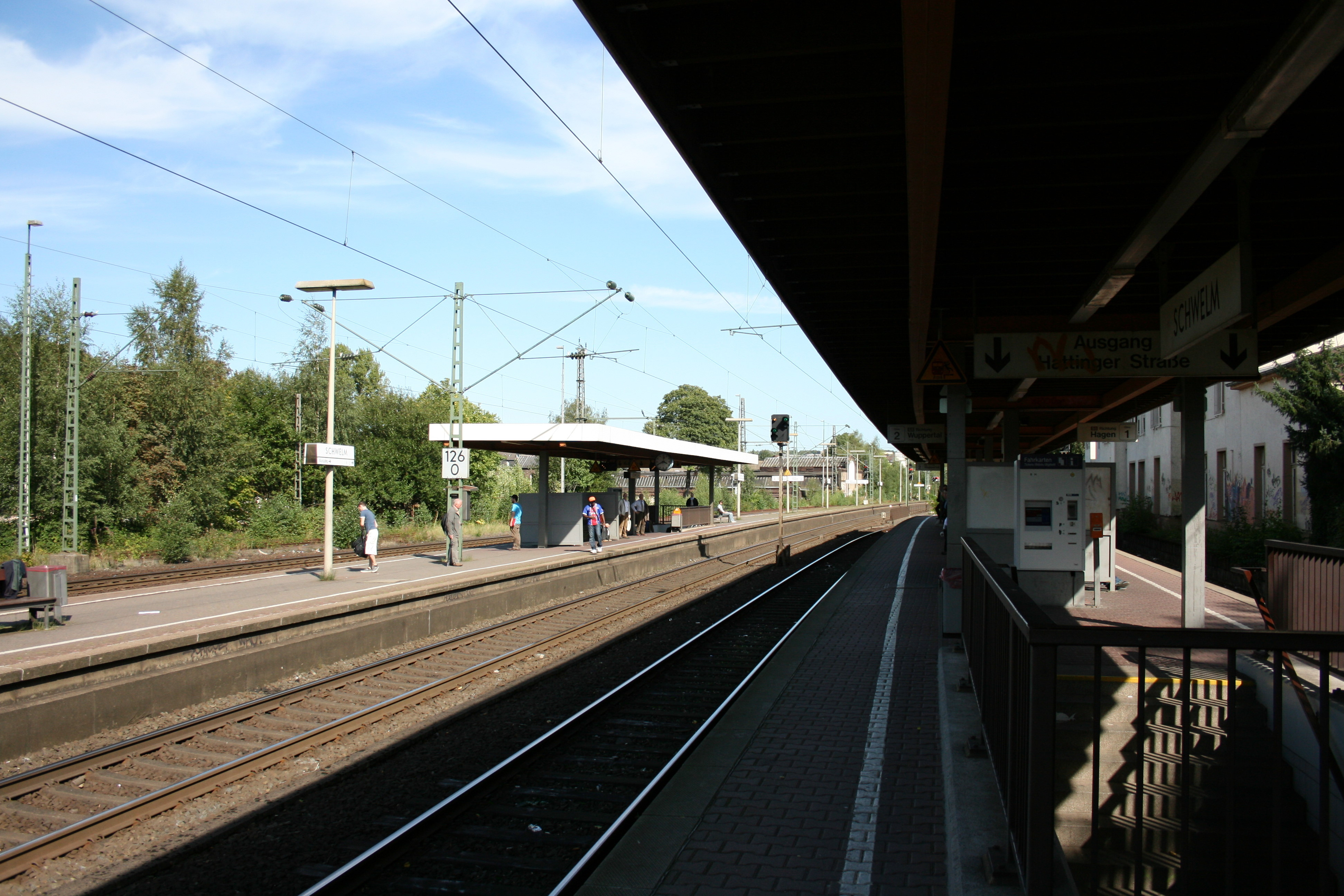 Bahnhof in Schwelm